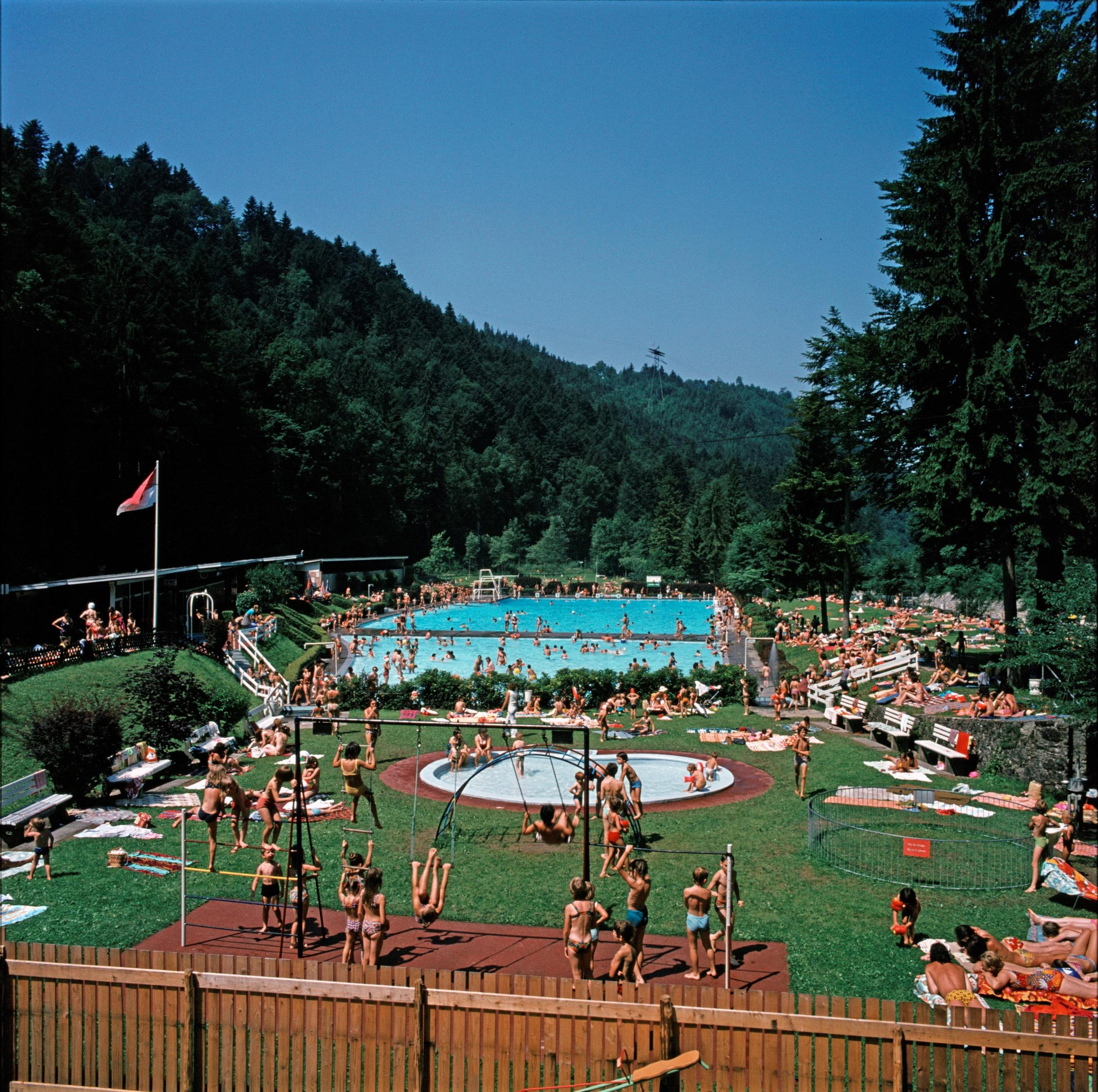 Ansicht des Waldbads Enz in Dornbirn im Juli 1975.